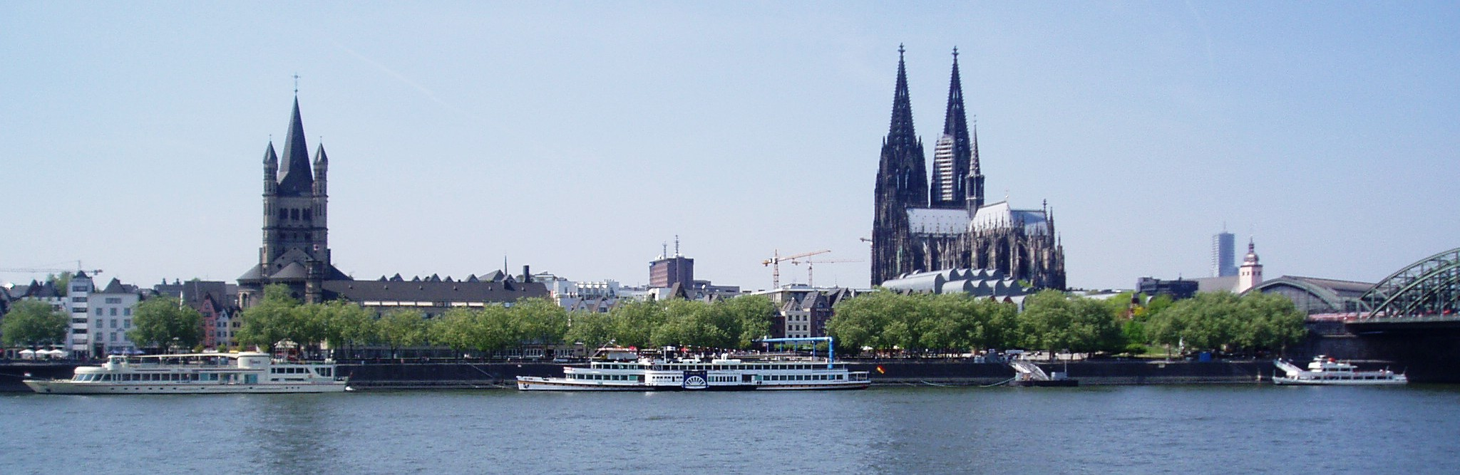 Köln-Panorama, Kölner Dom mit Raddampfer Goethe